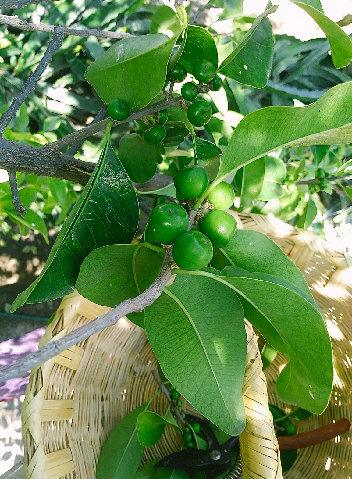 Recogiendo frutas de tempesquistle (Sideroxylon palmeri) en mi jardín...